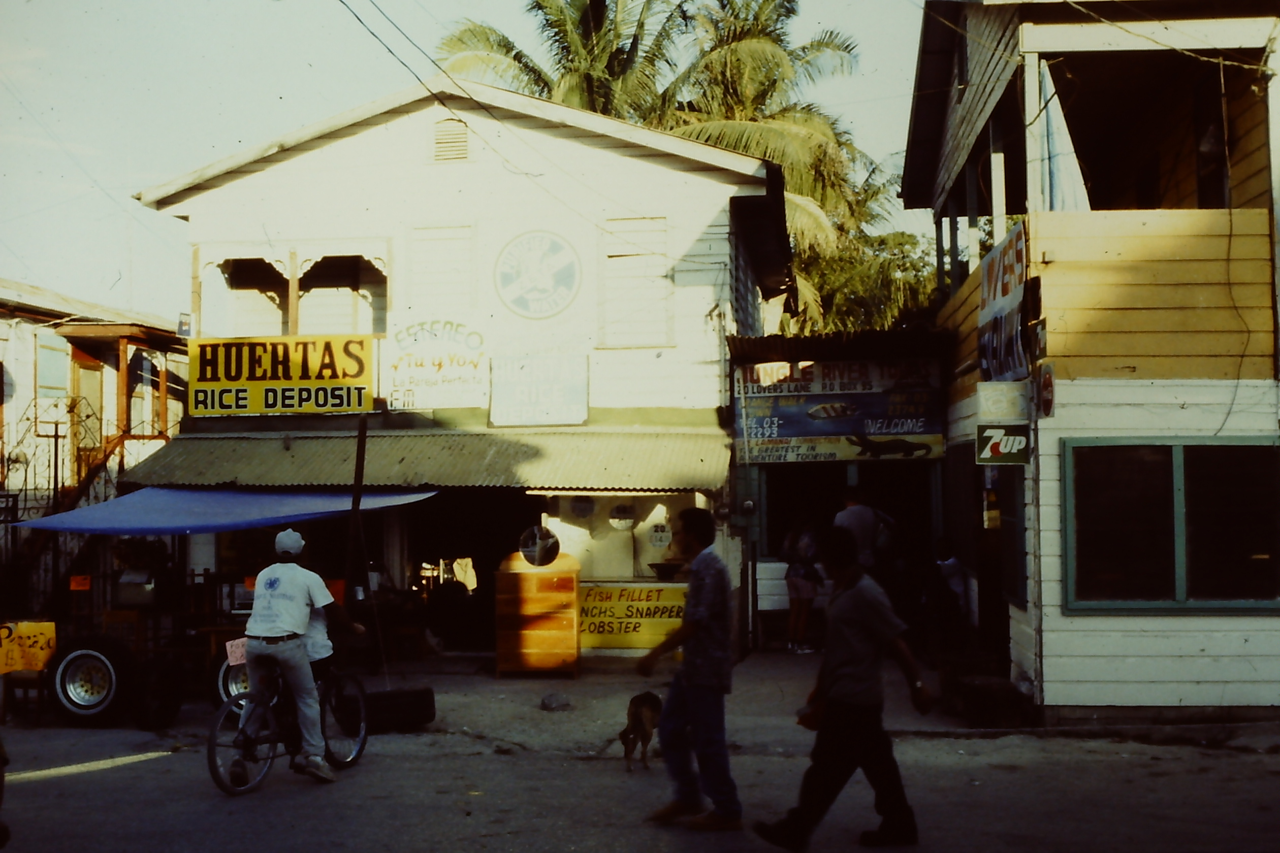 Orange Walk Strassenszene